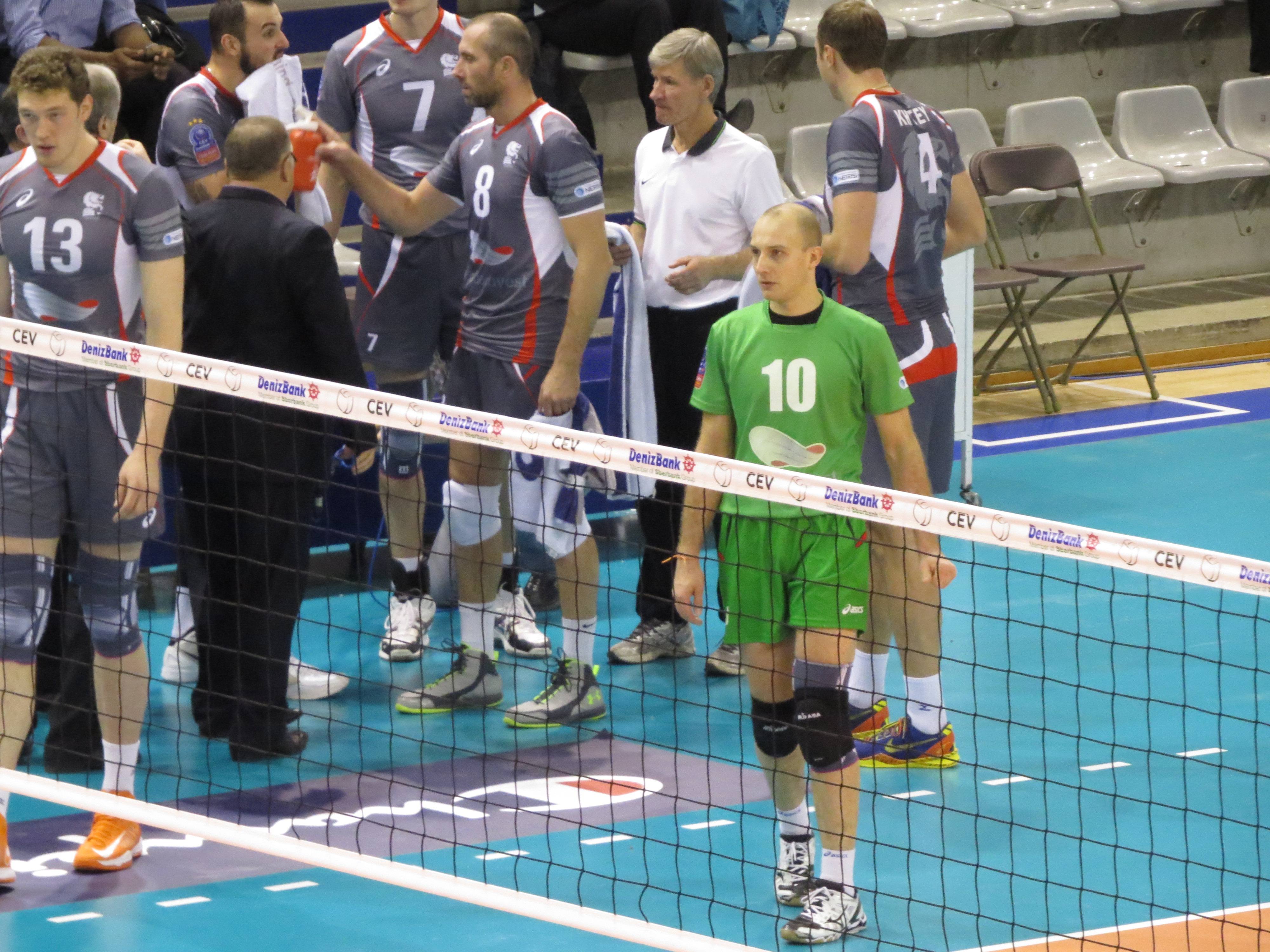 Photo réalisée lors du match de ligue des champions de volley entre le Paris Volley et le Lokomotiv Belgorod. Victoire de Belgorod 3-0 10:BRAGIN Roman